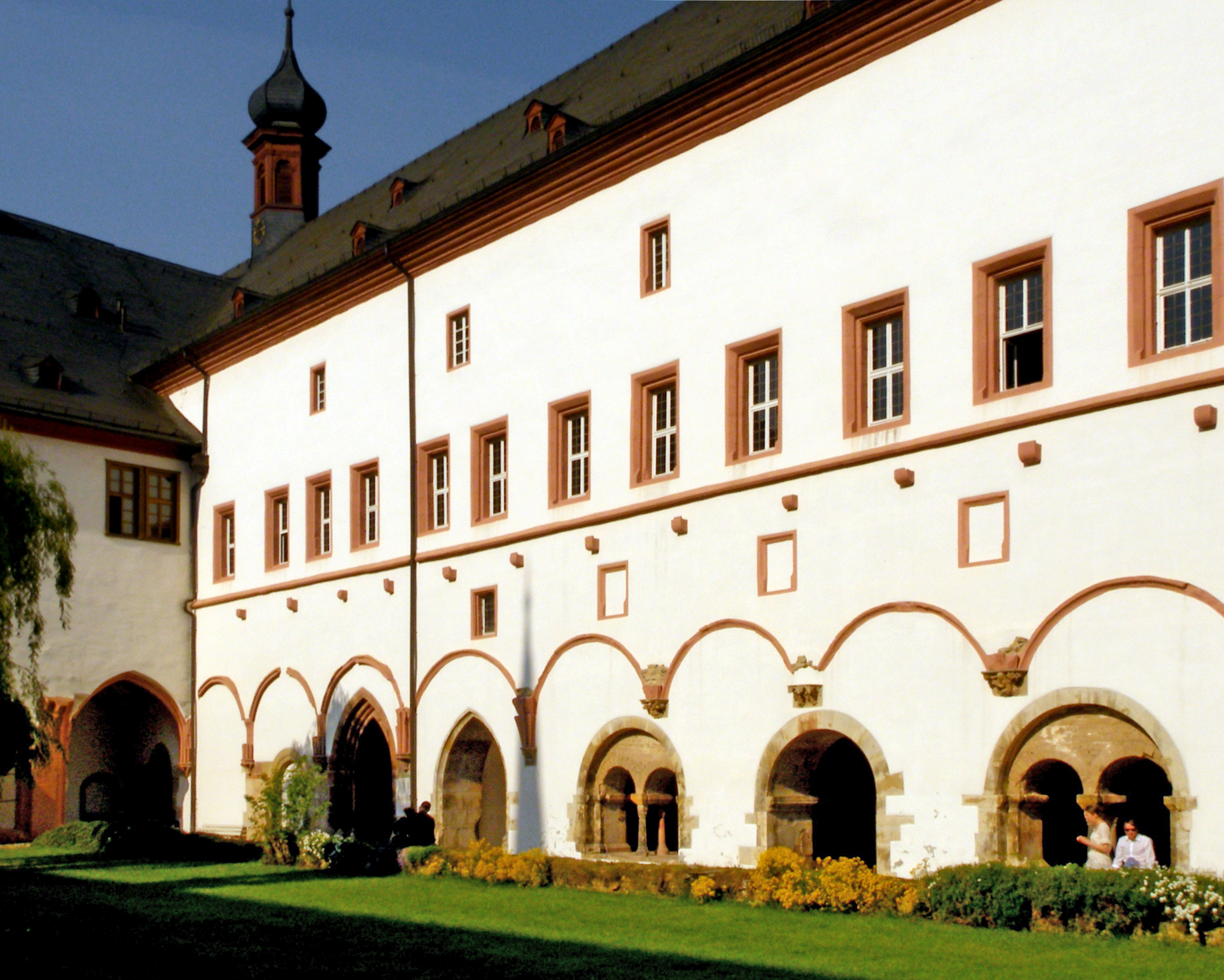 Kloster Eberbach, Innenhof